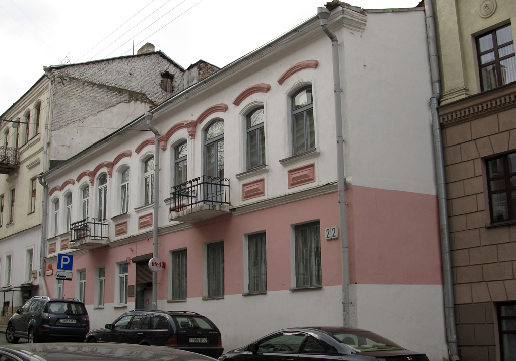 Мінск. Вуліца Рэвалюцыйная, 22